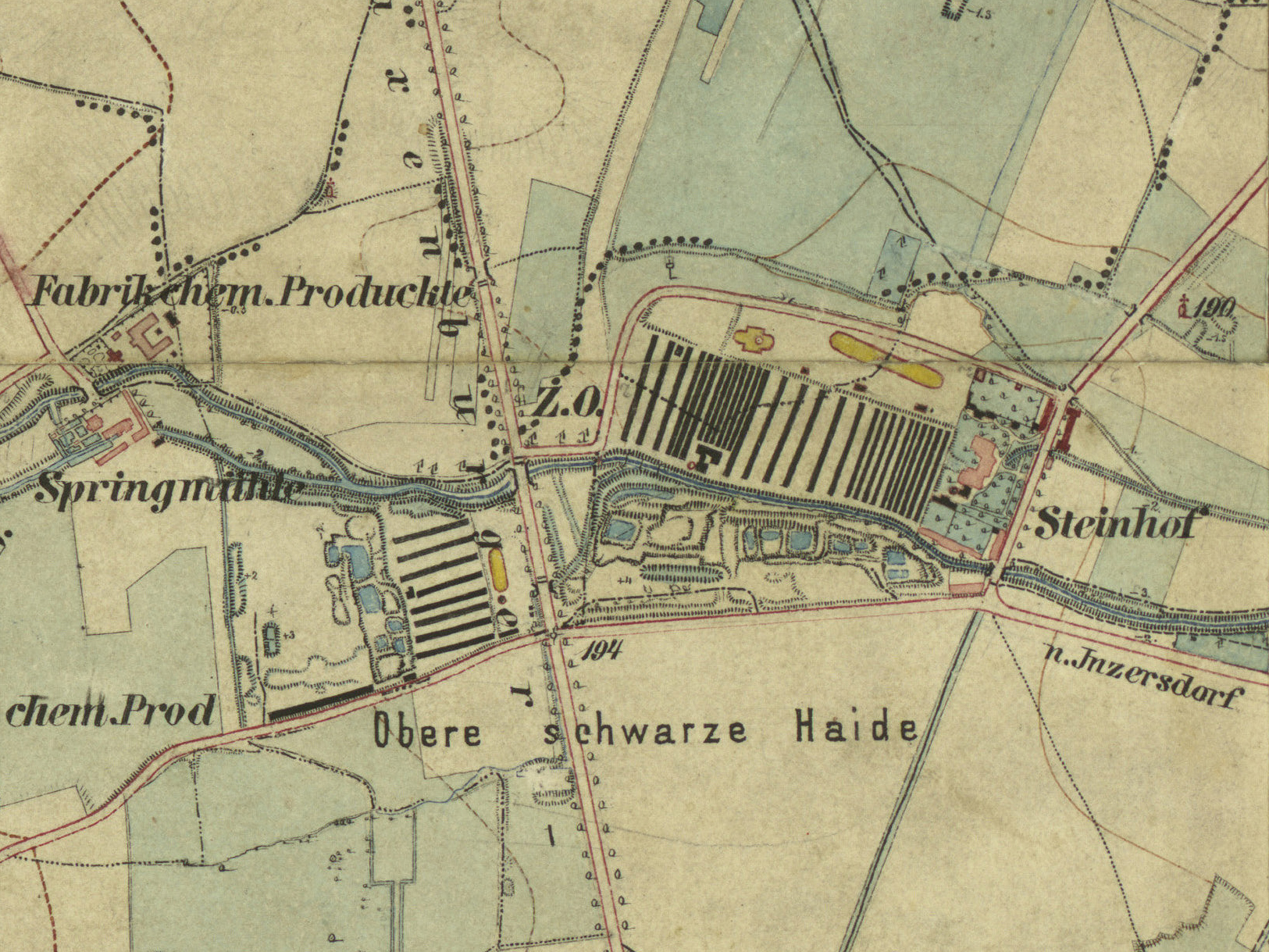 Herrschaft (Neu-)Steinhof bei Inzersdorf am Wienerberg. Kartenausschnitt aus: Gradkartenblatt Zone 13 Colonne XIV Section b4 (später 4756/2d). Franzisco-josephinische (3.) Landesaufnahme der österreichisch-ungarischen Monarchie. Aufnahmeblatt 1:12.500. Aufgenommen 1872